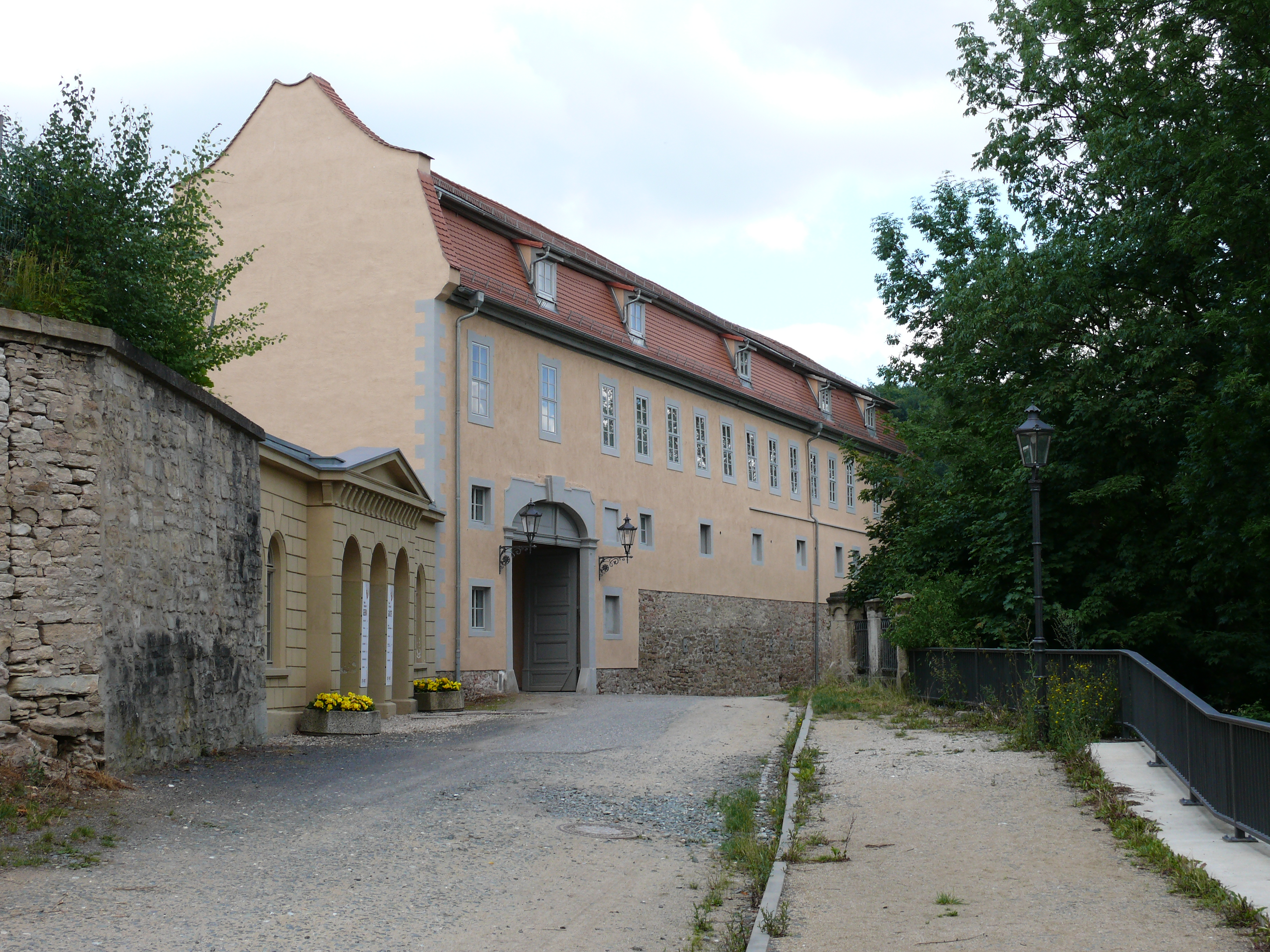 Schloss Osterstein Gera, ehemalige Wache und Nebengebäude